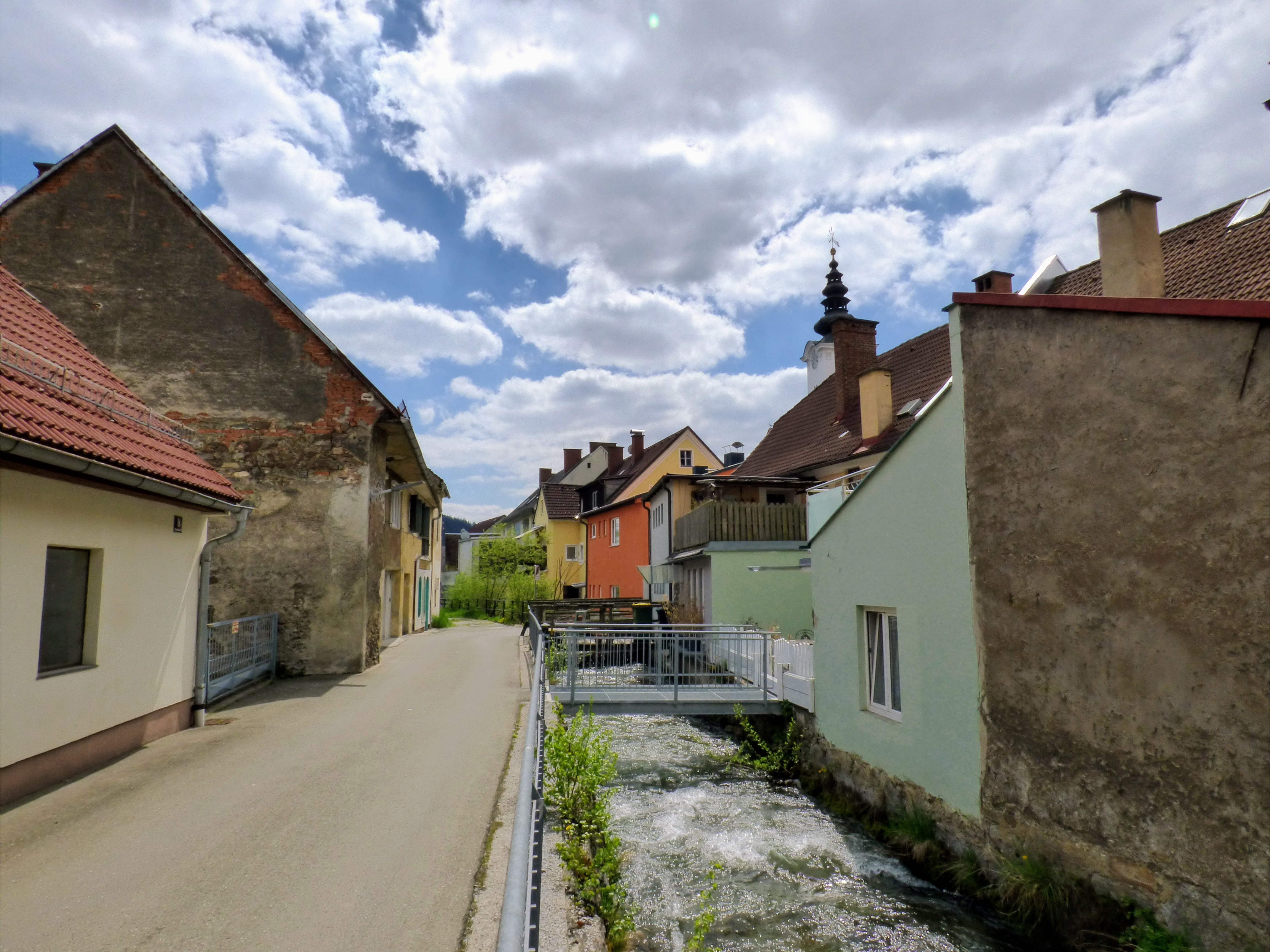 Straßenzug Rossmarkt in Trofaiach, Steiermark